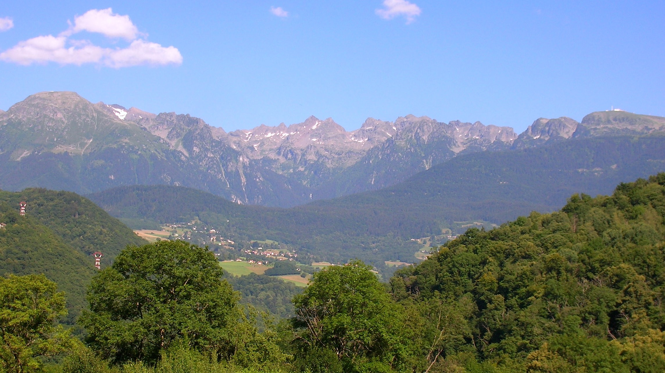 panorama Saint-Martin-d'Uriage preso dal sentiero tra col du Gourlu et le Murier.